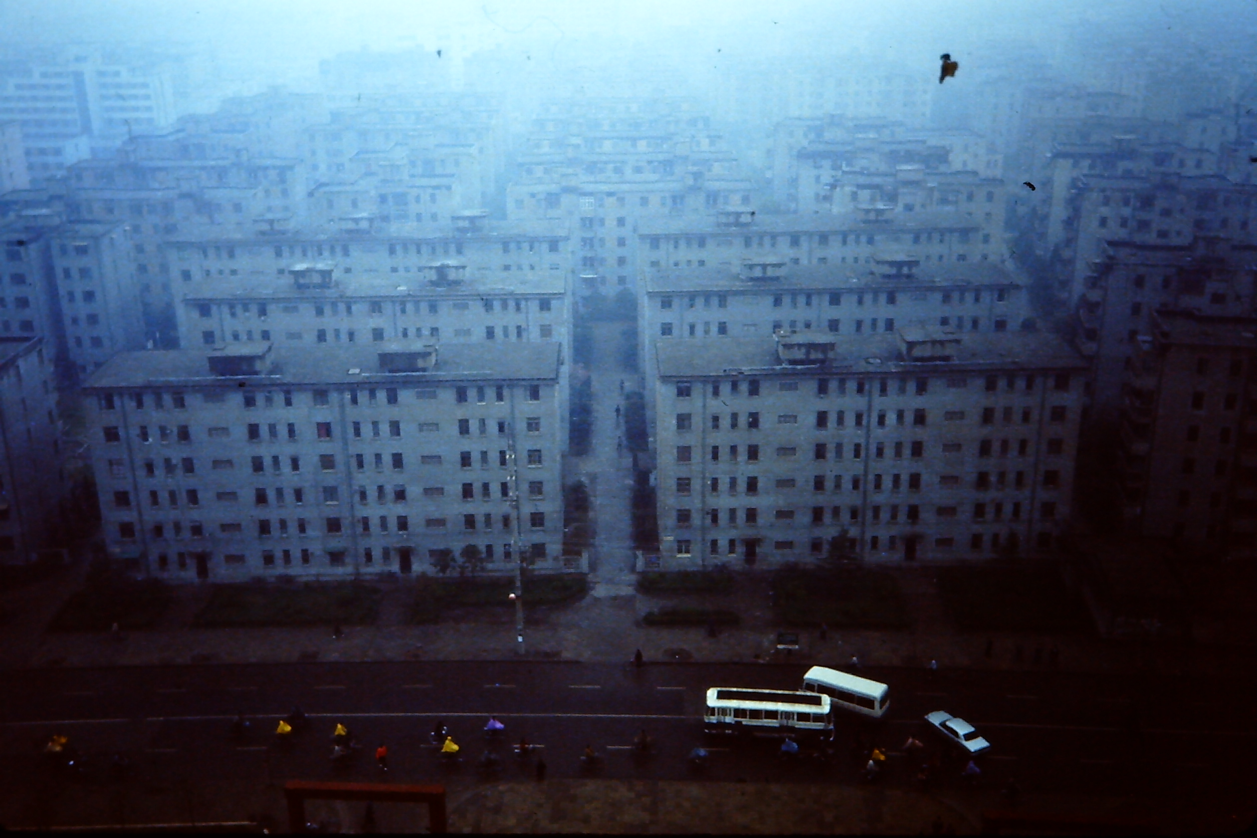 Tian Lin Xin Cun, Shanghai 1992